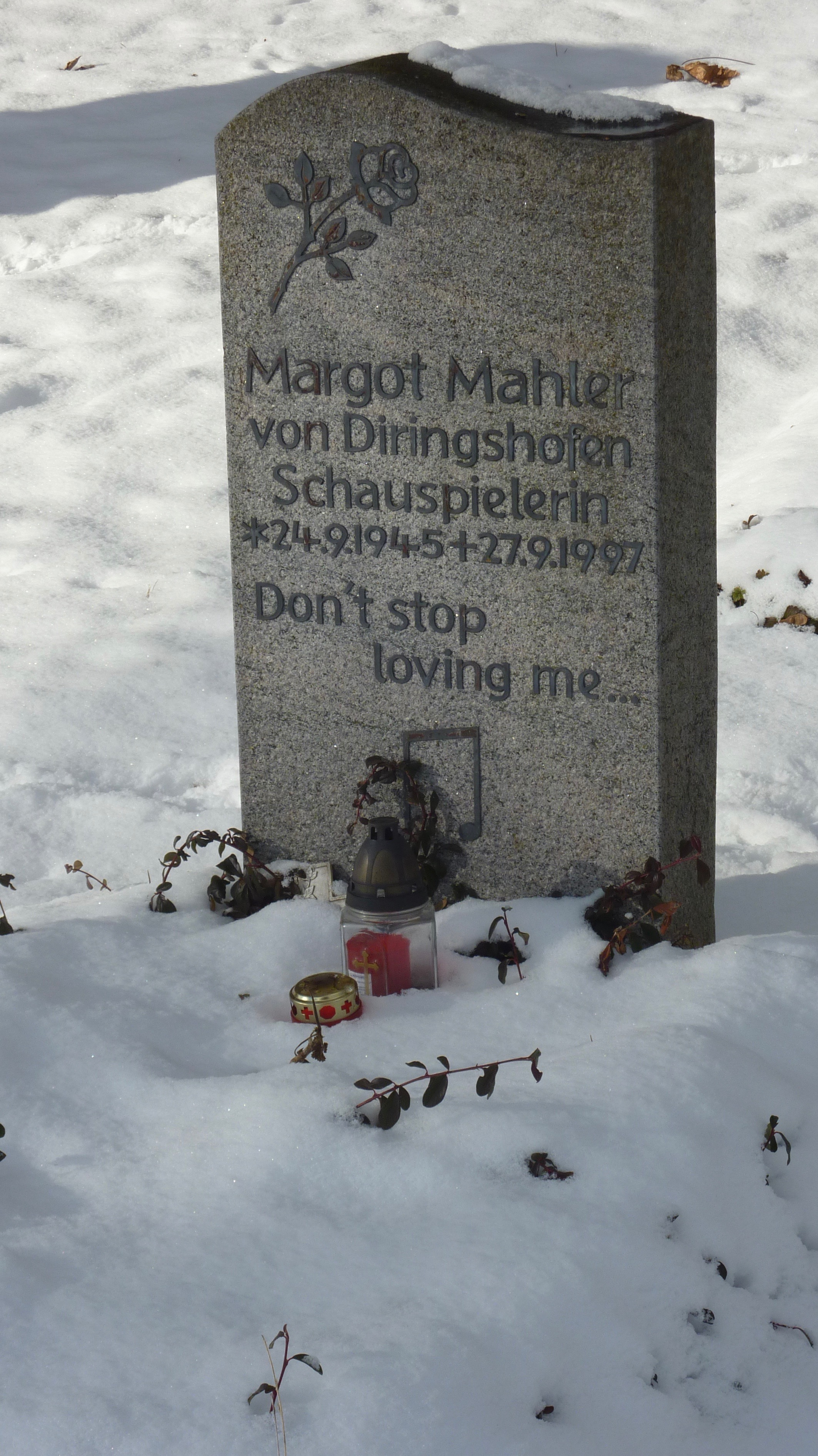 Grab der Schauspielerin Margot Mahler von Diringshofen auf dem Neuen Südfriedhof (München)